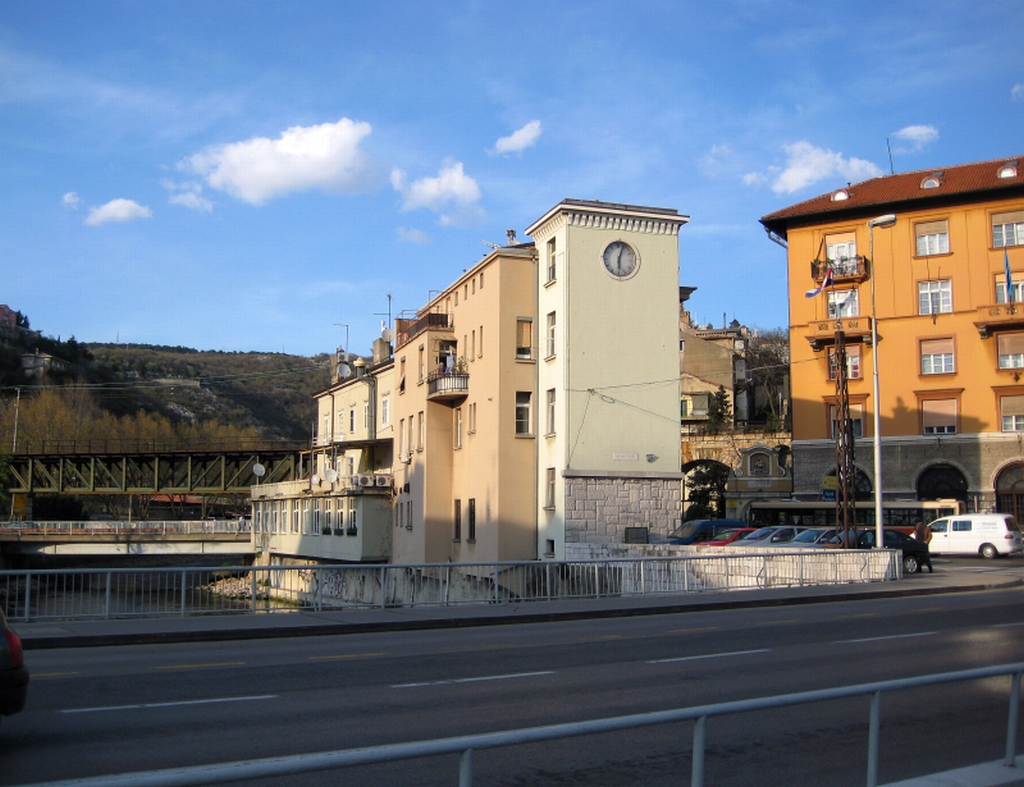 Most na Rječini gdje je nekada bila granica između Rijeke i Sušaka. Između zgrada nalazi se barokni trijem s reljefom Bogorodice Tješiteljice žalosnih na početku Stuba Petra Kružića.